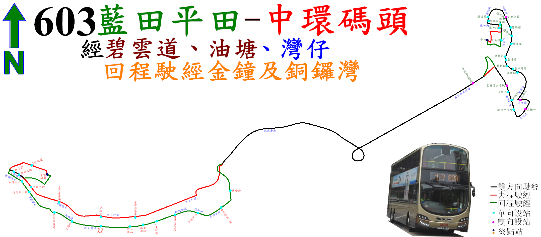 中文（香港）: 過海隧巴603線的走線圖